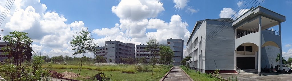 ইঞ্জিনিয়ারিং কলেজ, স্থান ফরিদপুর।